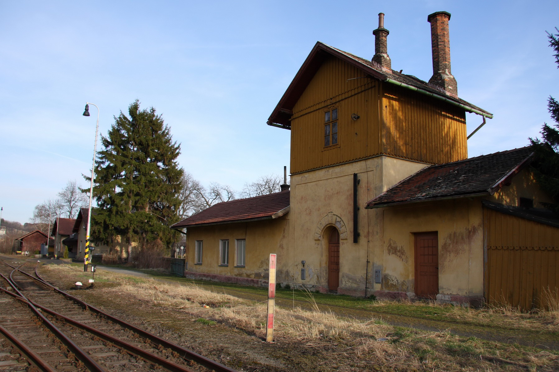 Lost Railway, Třebívlice